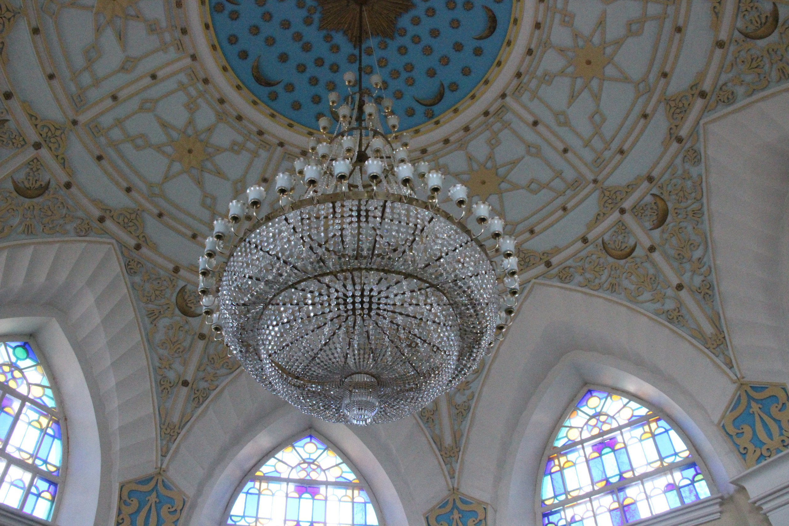 Купол мечети Каравансарая